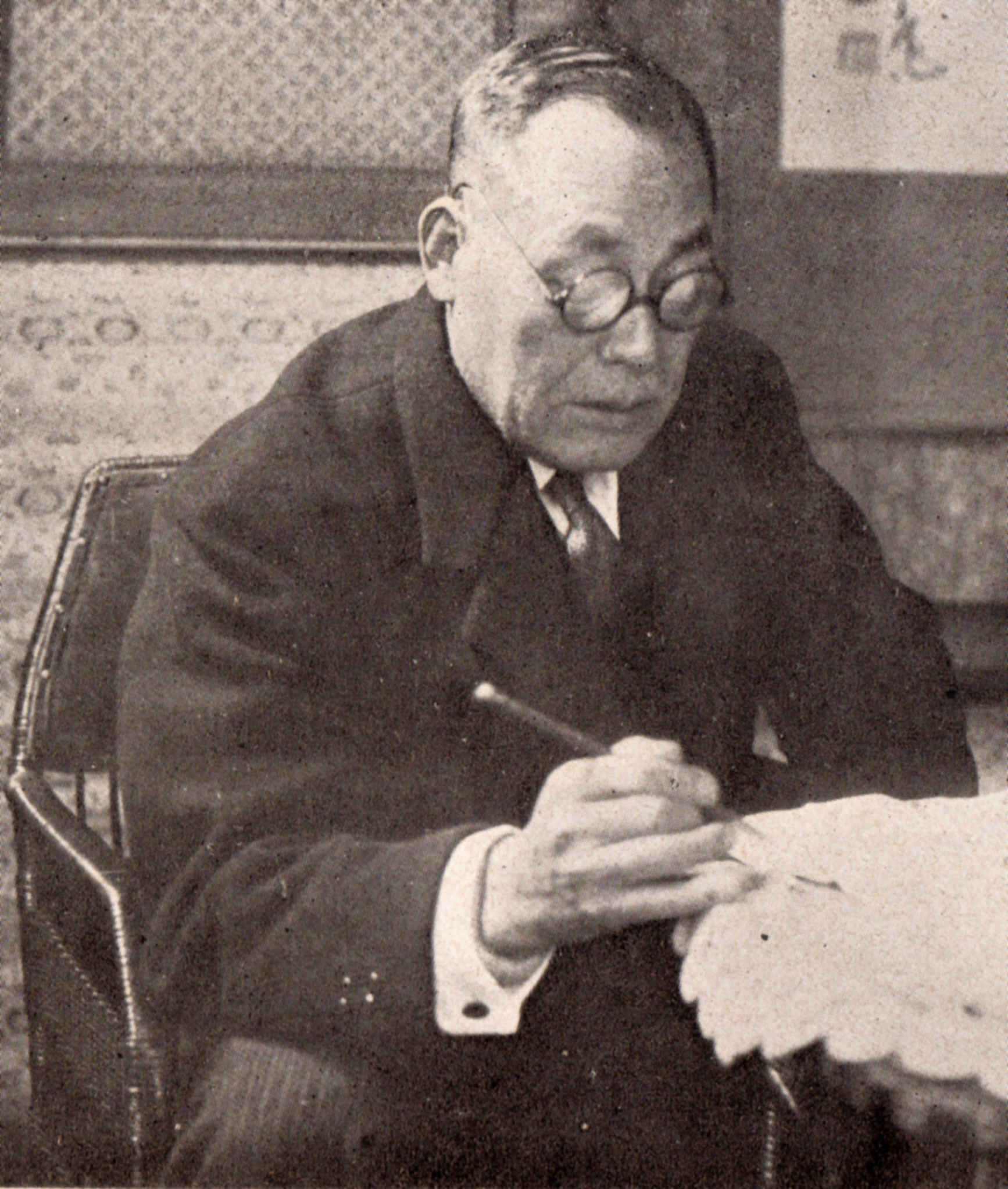 日本の政治的活動家・杉山茂丸の肖像。